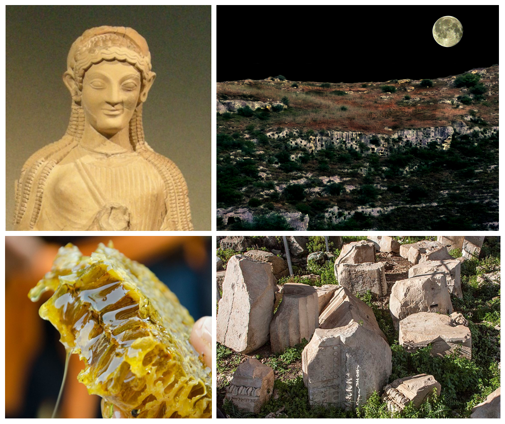 Collage sugli Iblei realizzato con immagini di wikimedia commons: vd. categorie di Pantalica, valle dell'Anapo e Megara Iblea.